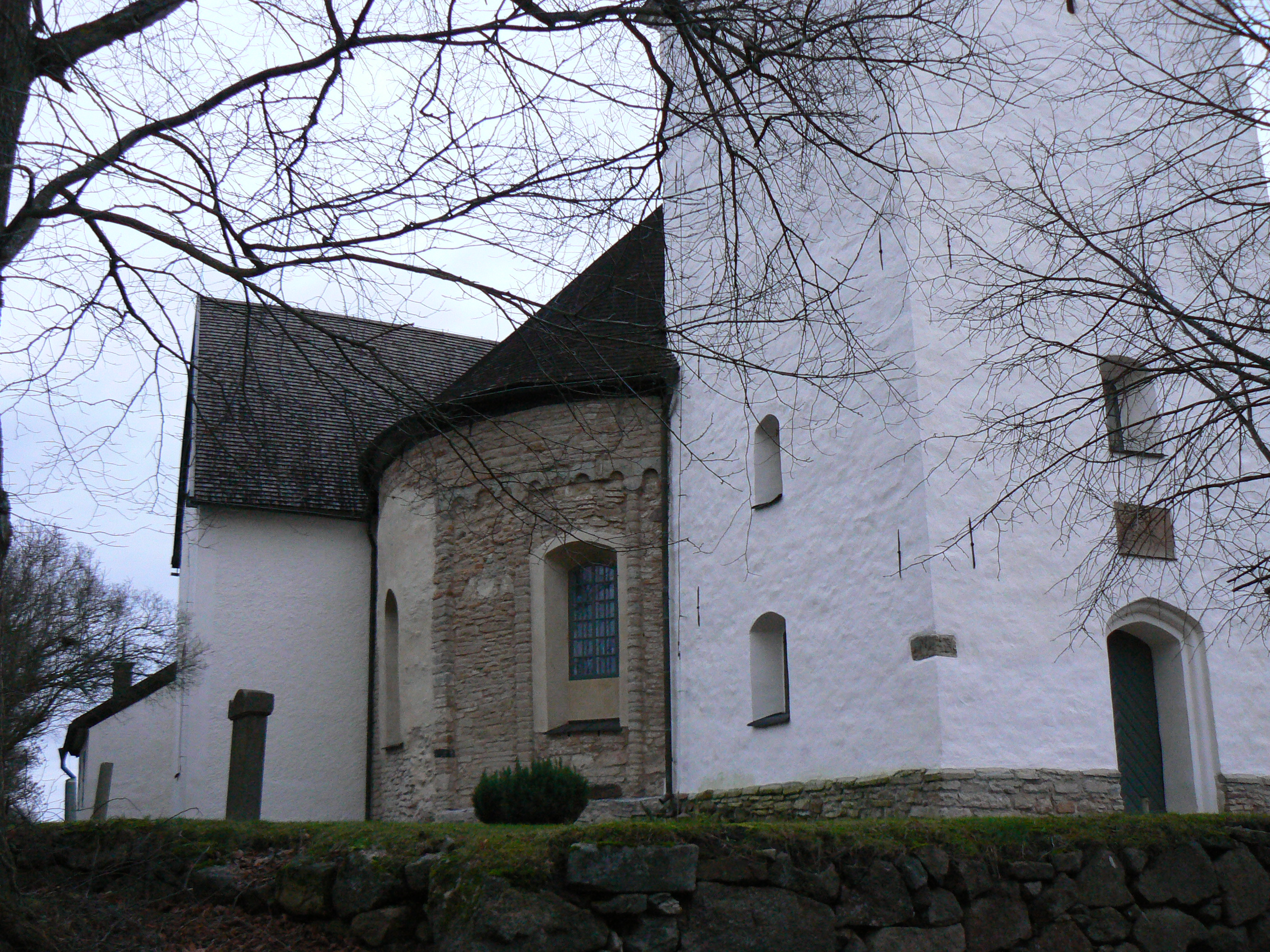 Vägg av den gamla rundkyrkan i Vårdsbergs kyrka, Linköping. Photo by Skvattram 2006-12-09.